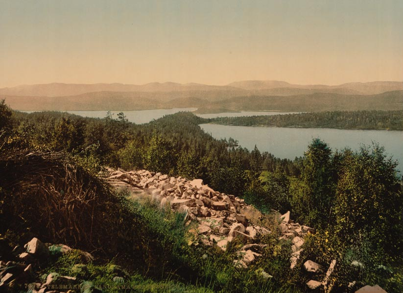 Panorama from Bolkesjo Telemarken (i.e Telemark) Norway